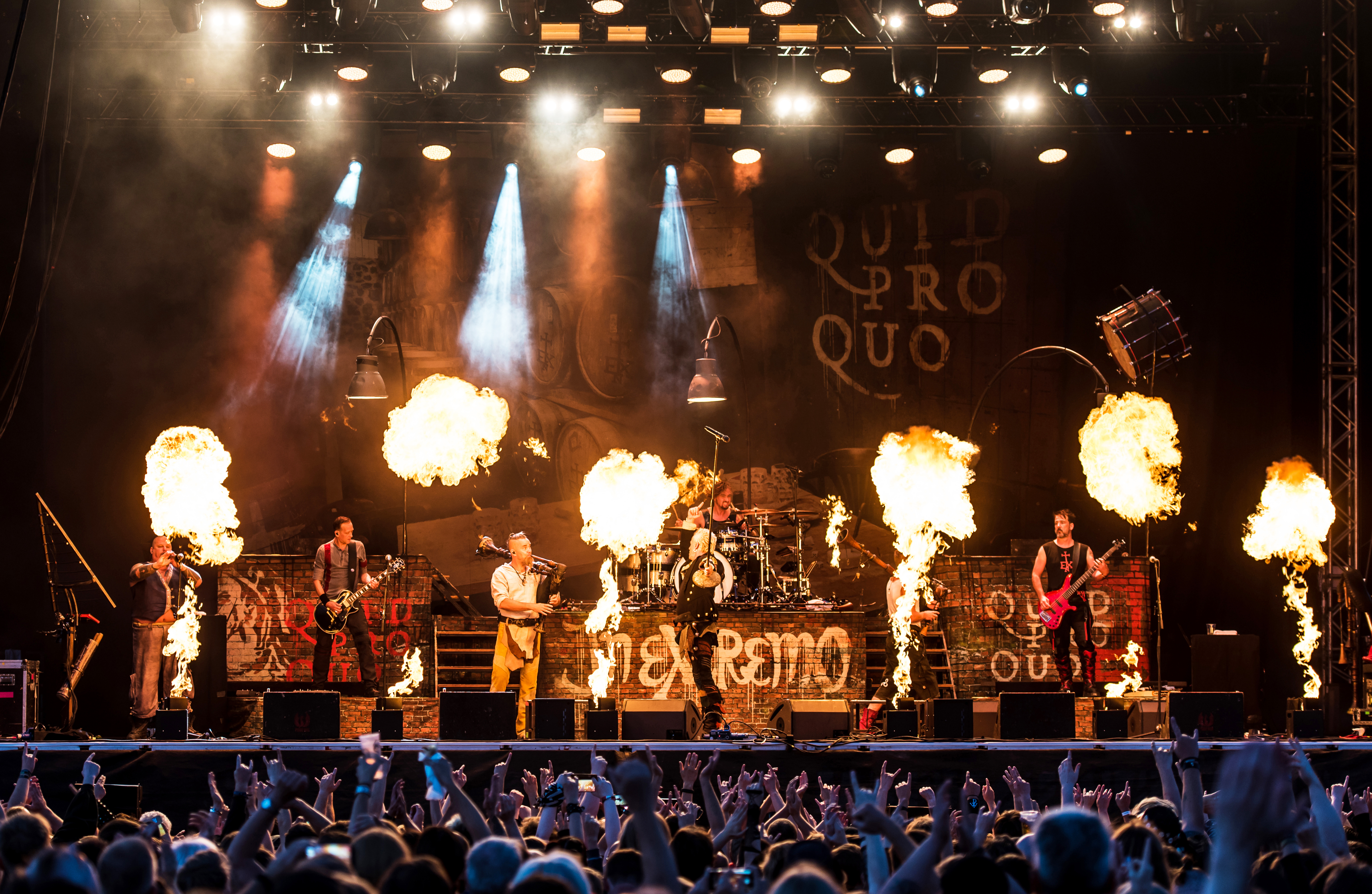 In Extreno beim Hammaburg Fest 2018